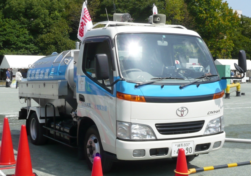 東京都水道局水道緊急隊の給水車。